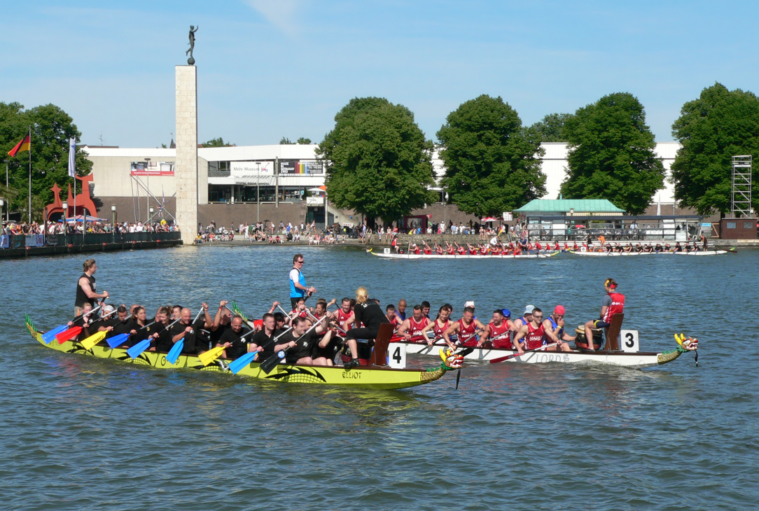 Foto vom 18. Drachenboot Festival Hannover auf dem Maschsee ...